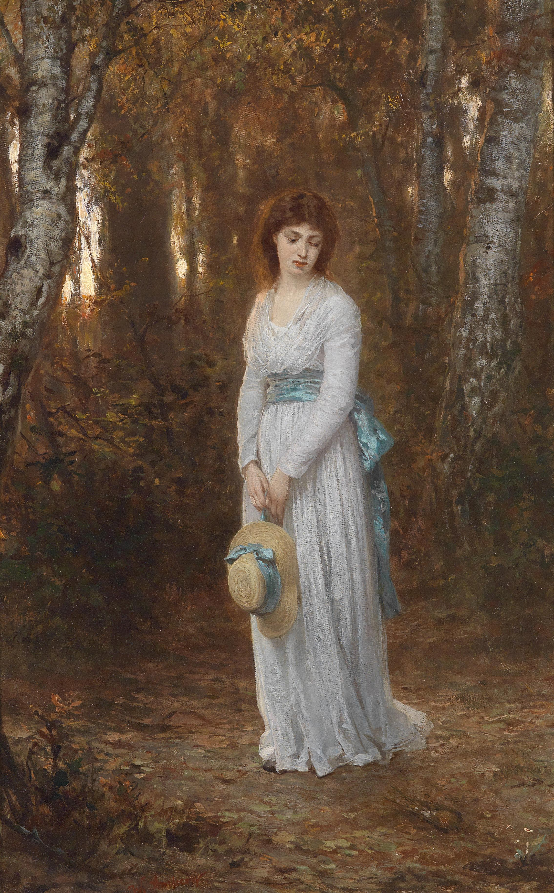 In Gedanken versunken, signiert W. Amberg, Öl auf Leinwand, 84 x 53,5 cm